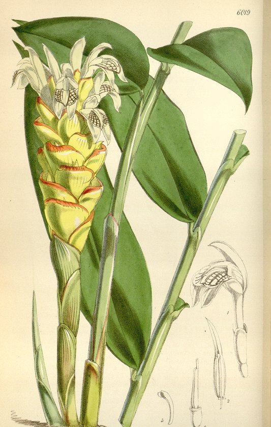 Zingiber parishii Hook.f. Planche 6019 du Curtis's Botanical Magazine Vol 99 année 1873